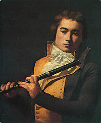 Retrato del flautista, fagotista y compositor François Devienne, por el famoso pintor David.